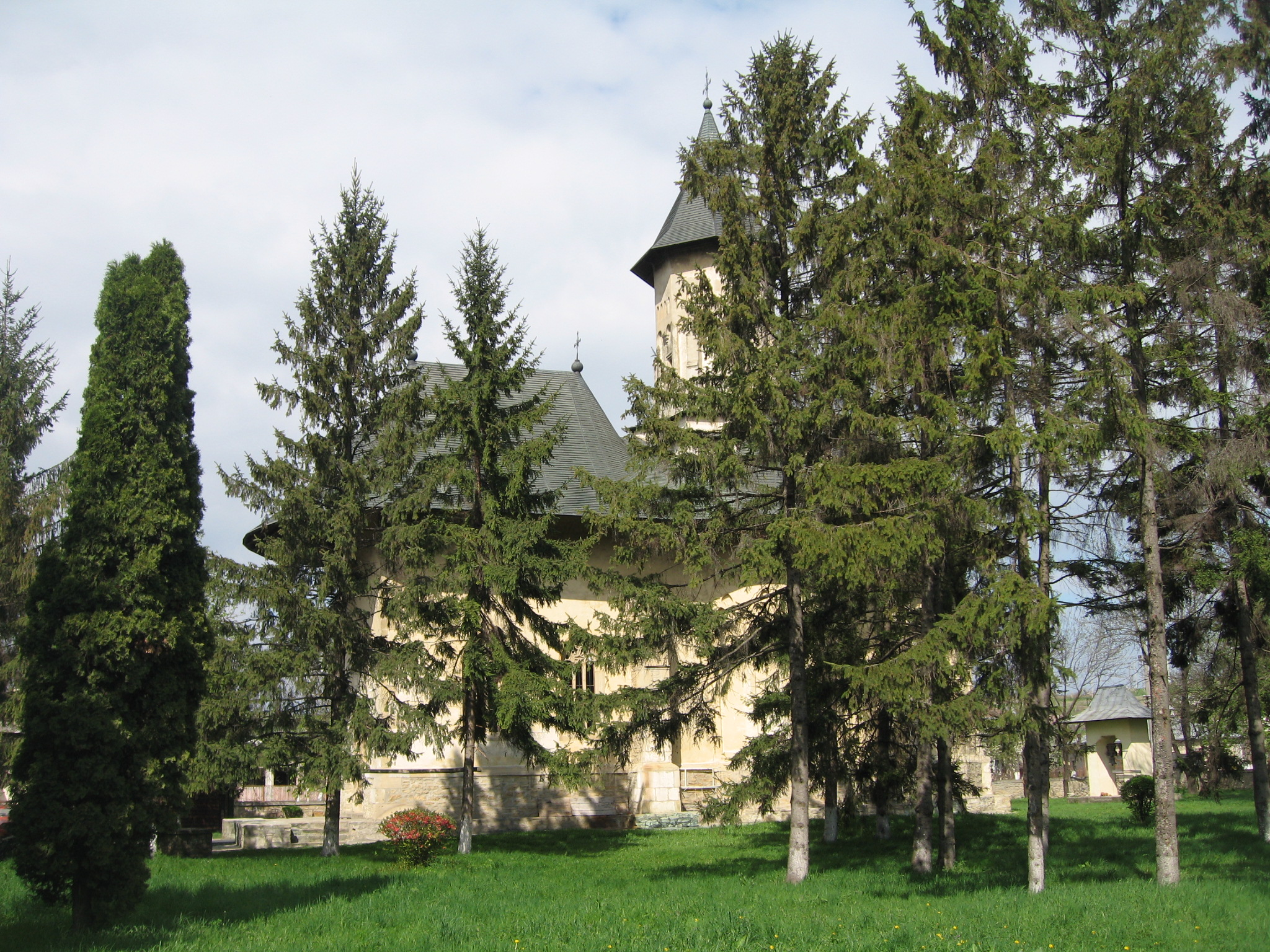 Biserica Sfântul Dumitru din Hârlău, judeţul Iaşi, România